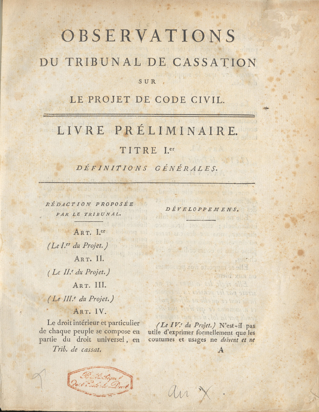 Observations du Tribunal de cassation sur le projet de Code civil